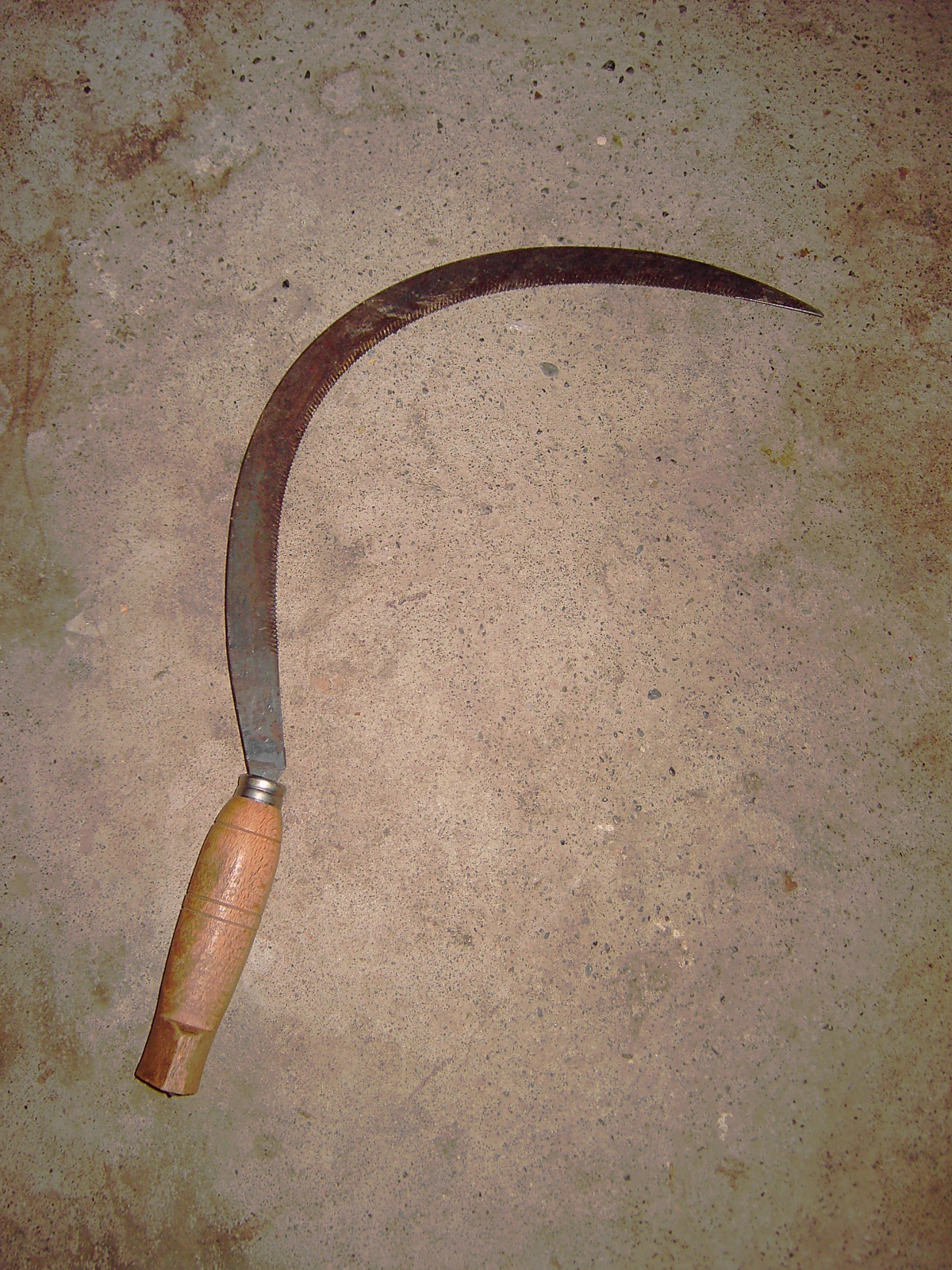 Hoz (Sickle) ligera, de borde aserrado.